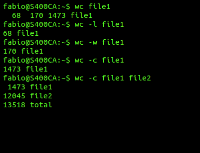 wc command